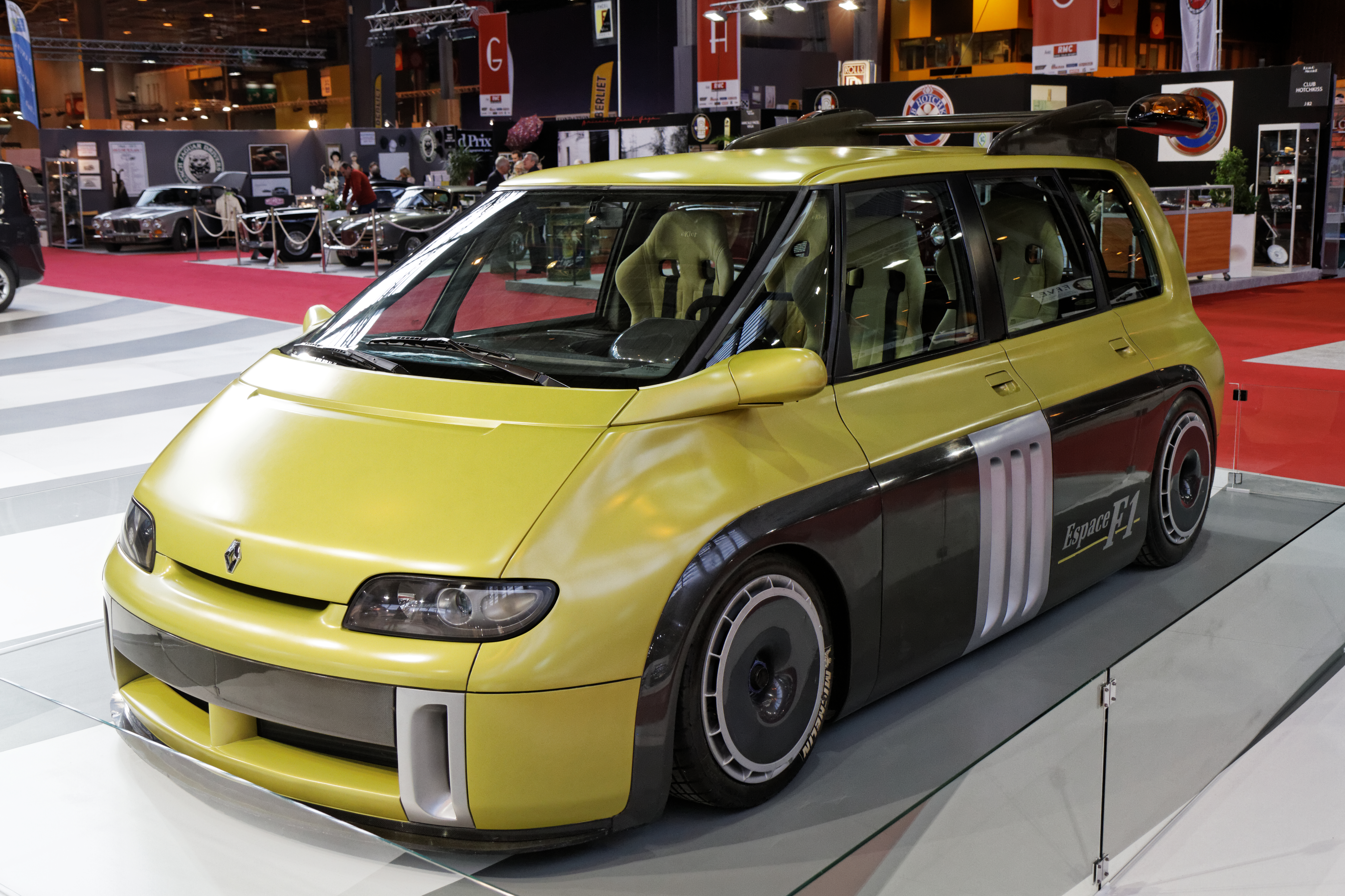 Une Renault Espace F1 présentée lors du salon Retromobile 2014.